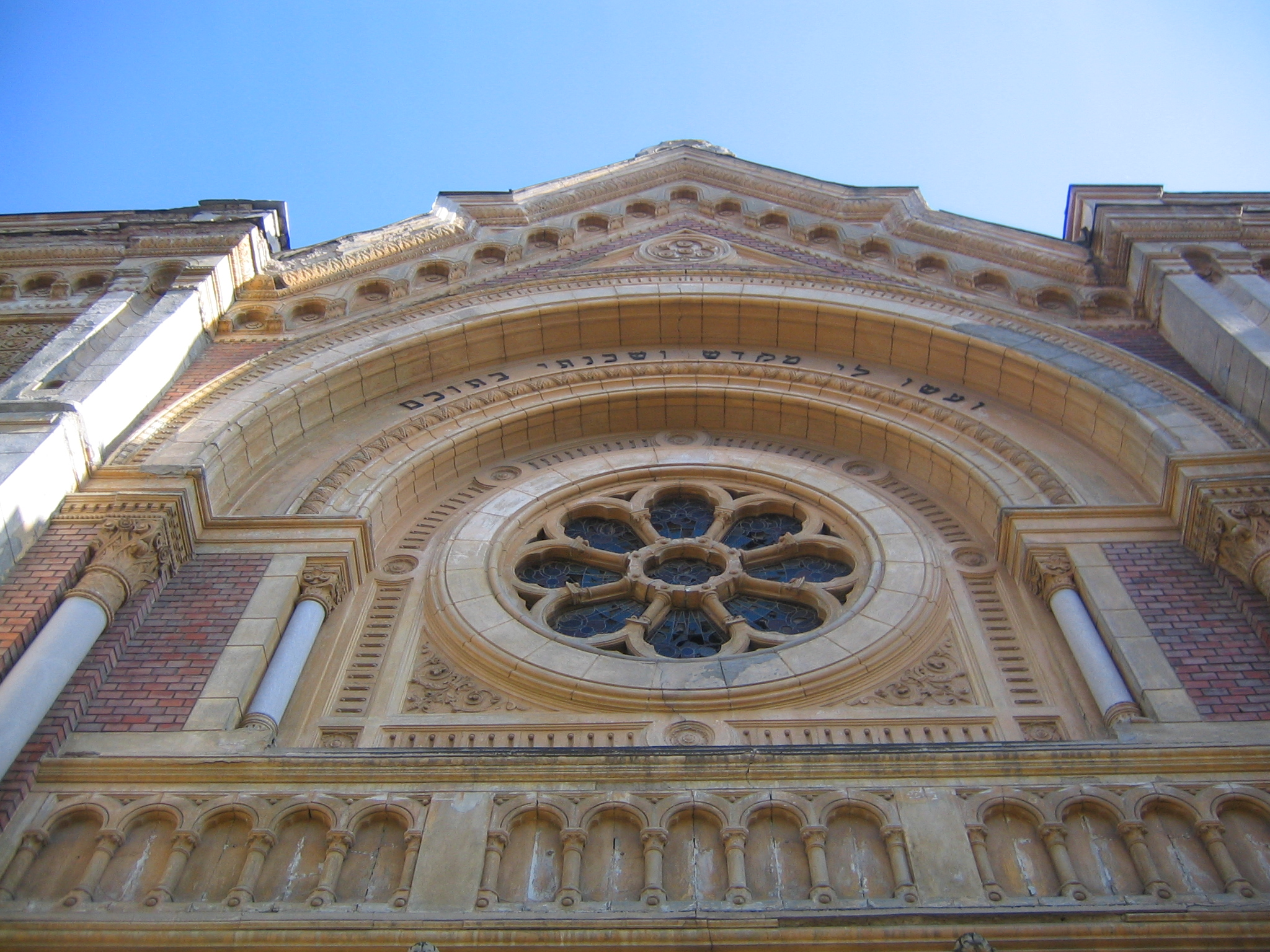 Sinagoga din Fabric, Timisoara, Romania